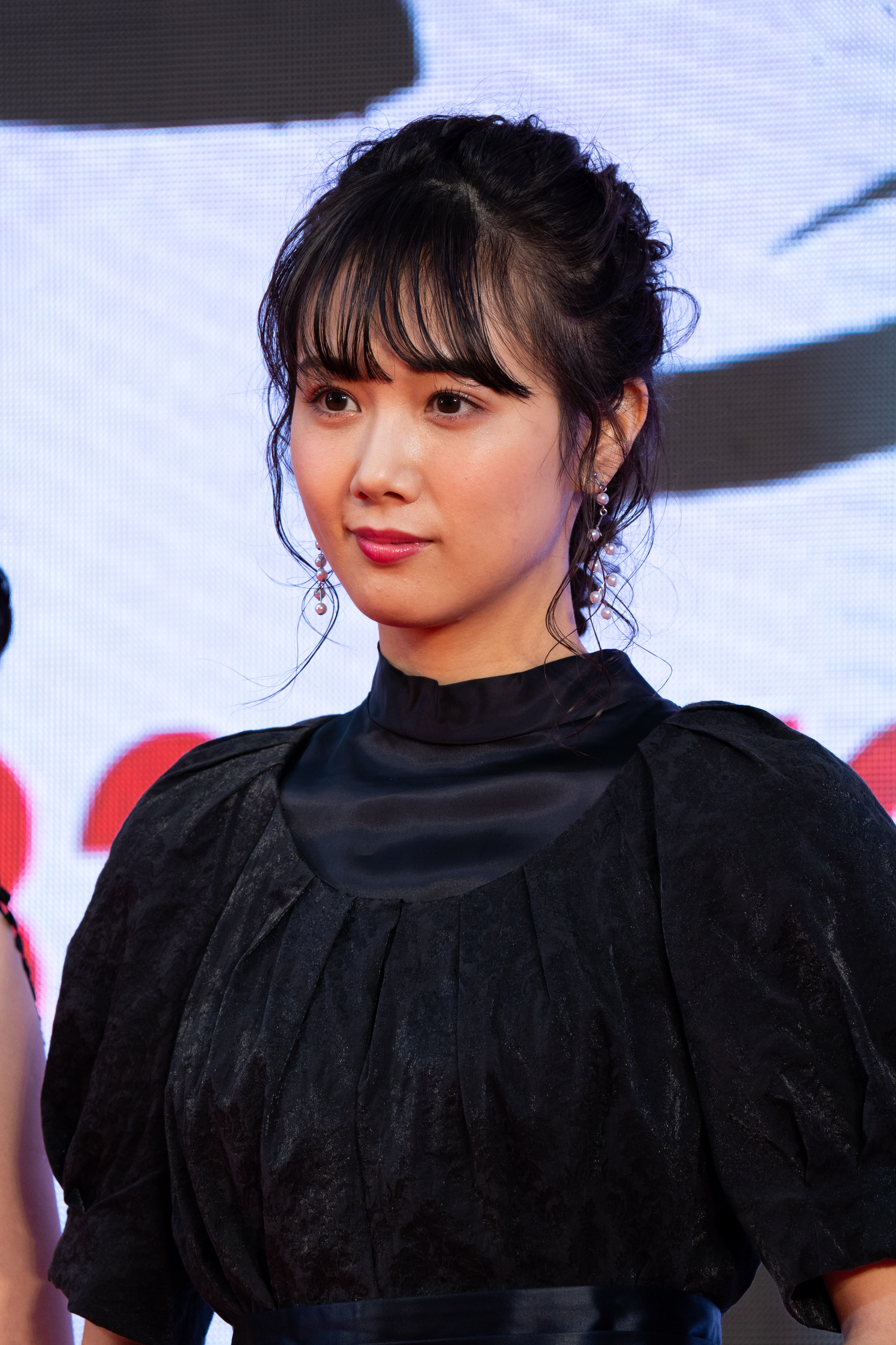 第32回 東京国際映画祭 オープニングセレモニー 永島聖羅 (LINE LIVE)